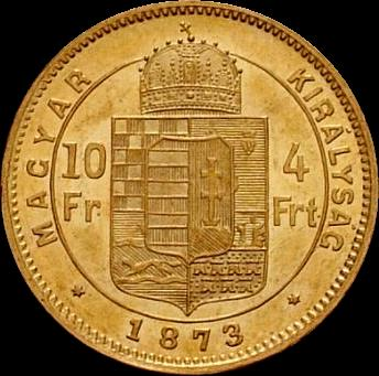 4 forint / 10 frank 1873 - obverse